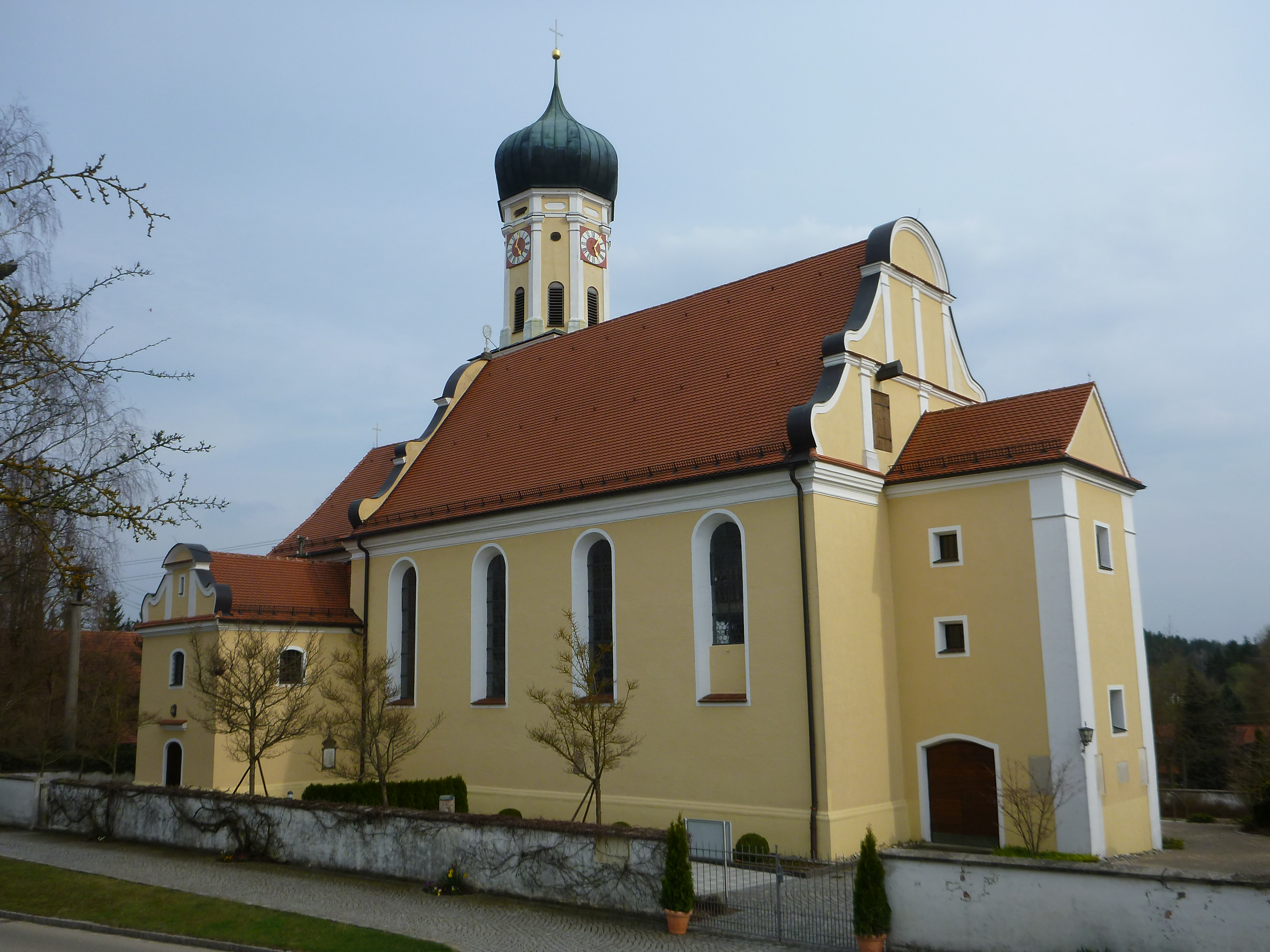 Katholische Pfarrkirche St. Laurentius Ehingen, barocker Neubau 1717/19 von Jörg Radmiller, 1928 verlängert; mit Ausstattung.